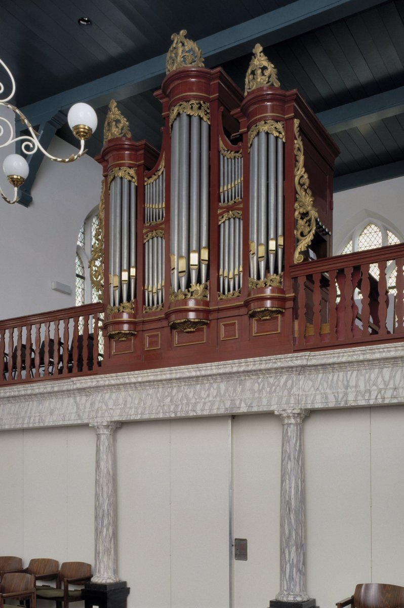 Nederlands Hervormde Kerk: Interieur, aanzicht orgel, orgelnummer 1143 (opmerking: Gefotografeerd voor Het Historische Orgel in Nederland 1858-1865)